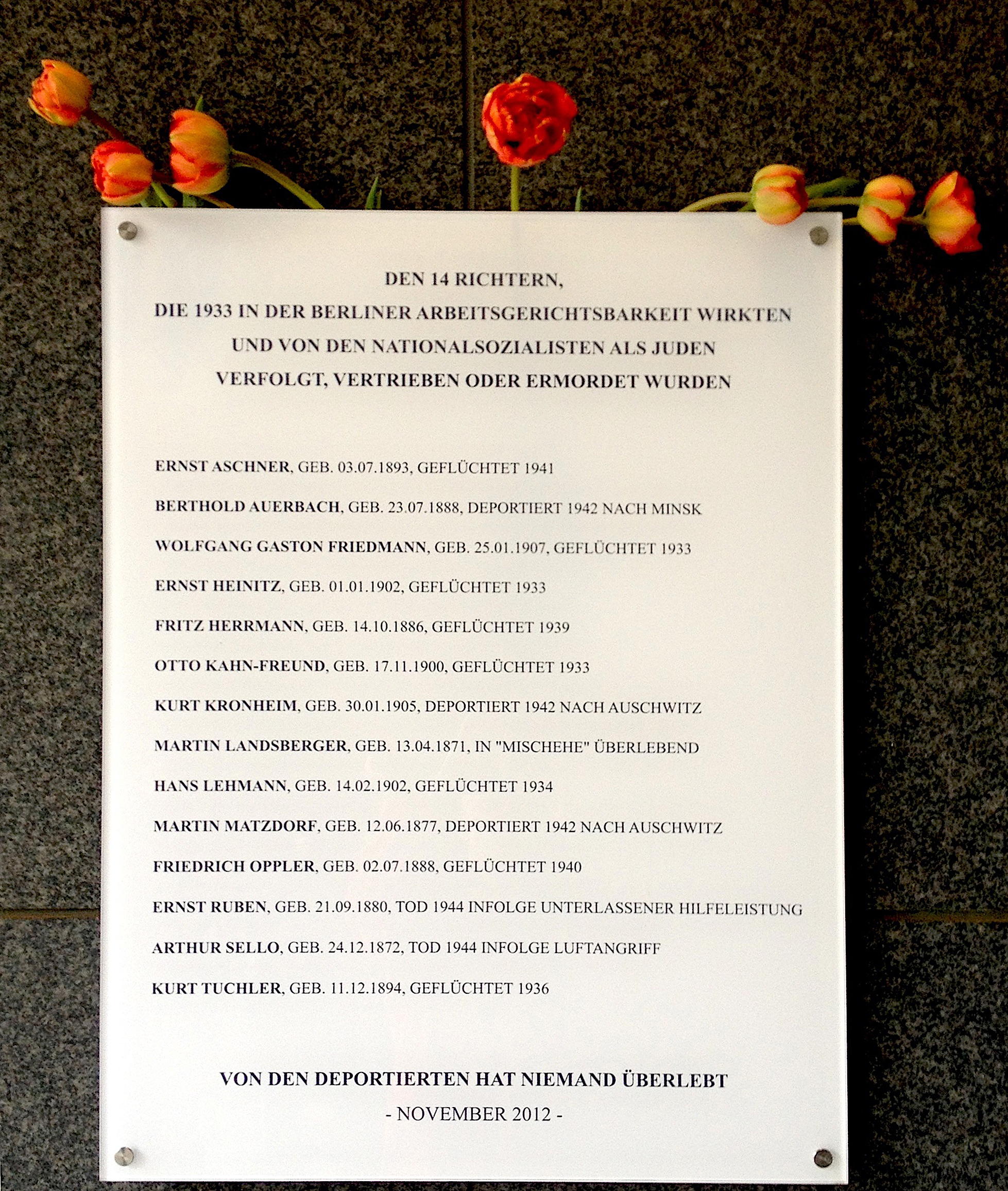 Gedenktafel zu Ehren der jüdischen Richter in der Berliner Arbeitsgerichtsbarkeit. Anbringung: November 2012